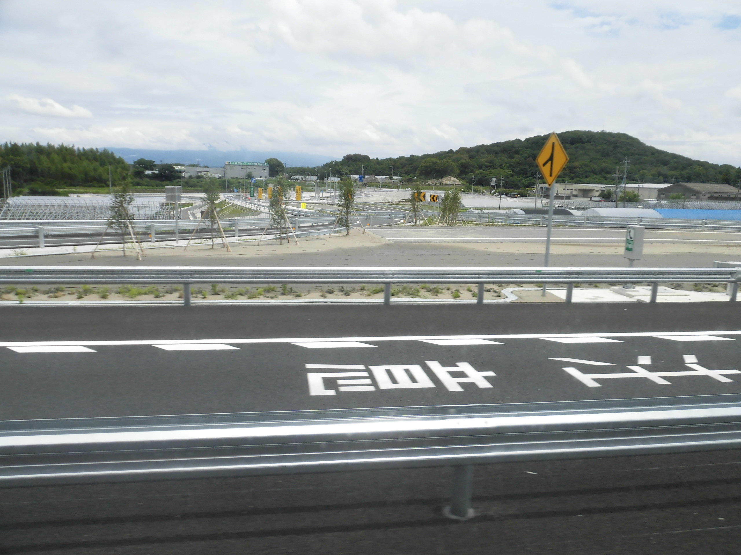 九州自動車道北熊本スマートインターチェンジ